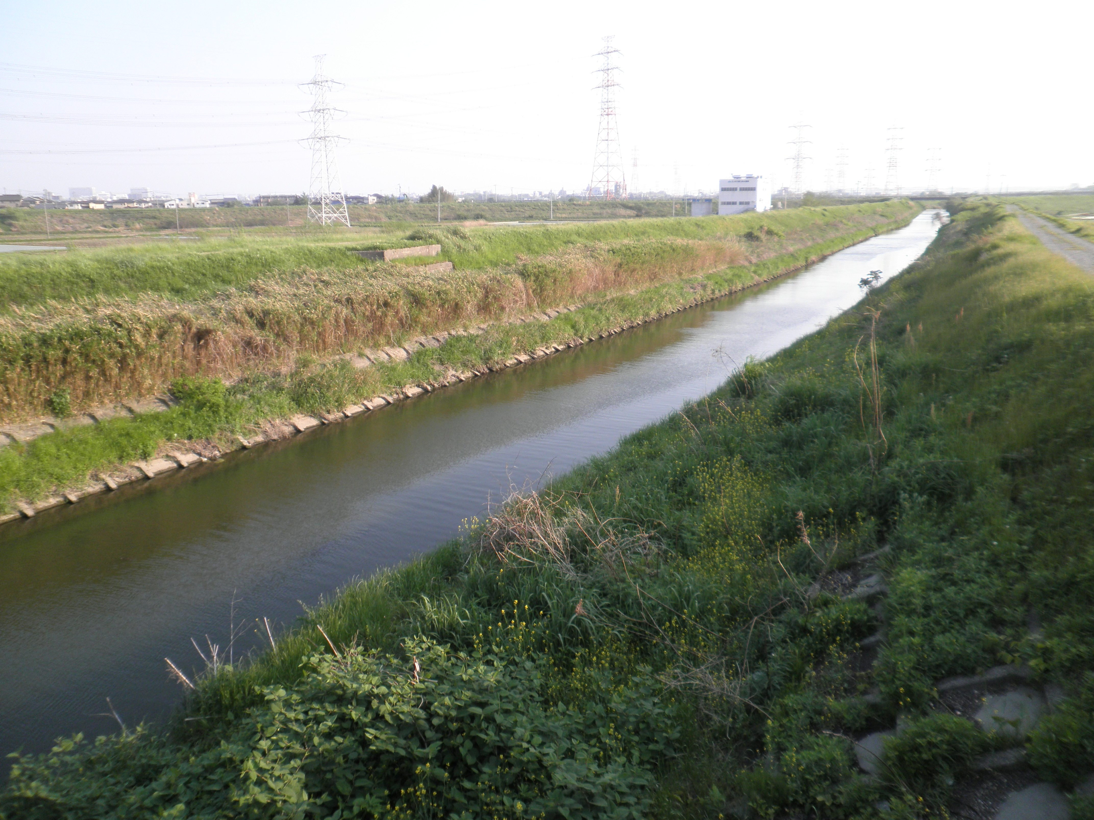 愛知県大府市を流れる皆瀬川を愛知県道244号線上から撮影